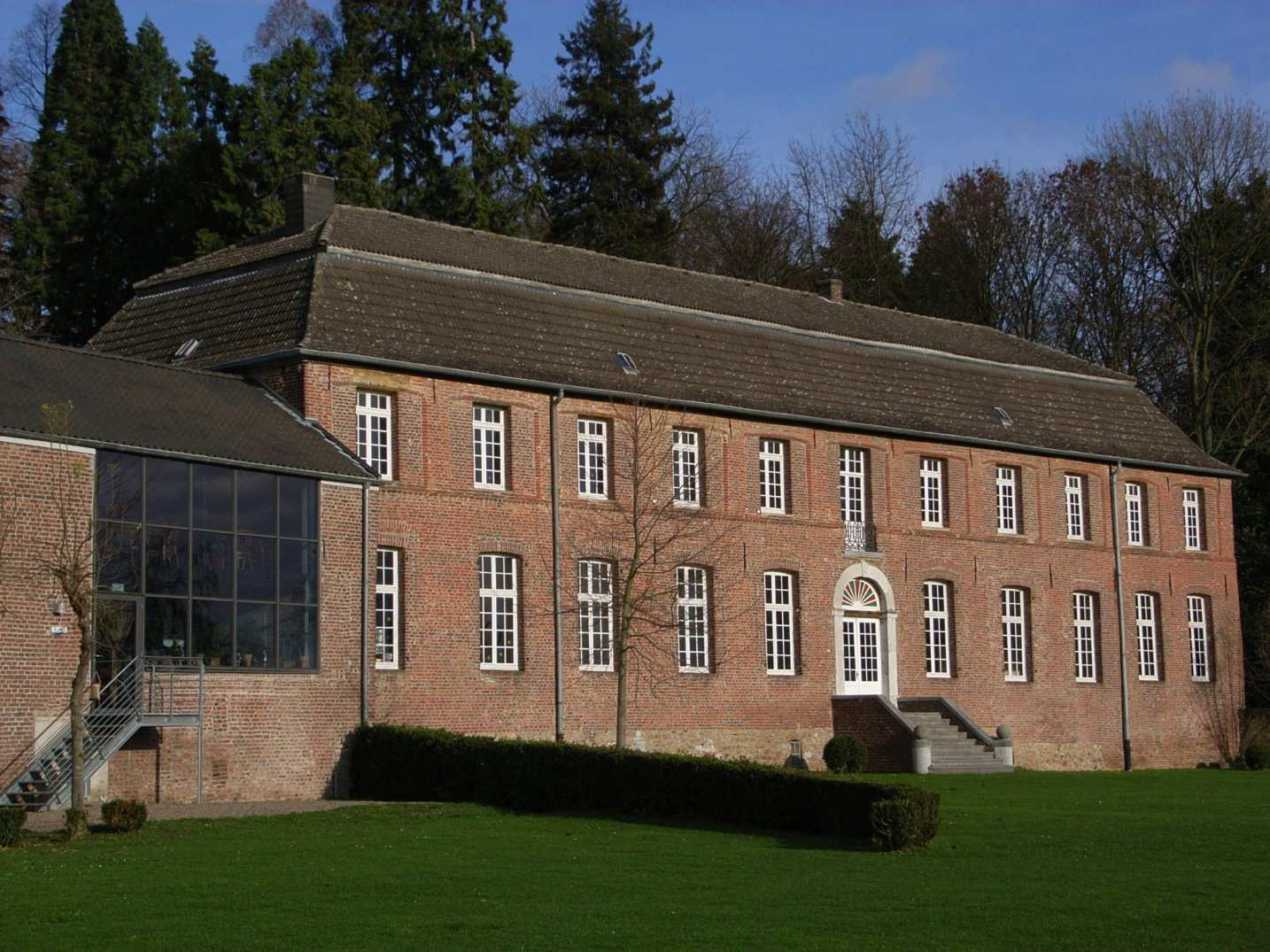 Haus Hohenbusch, Südseite, Erkelenz (Germany)